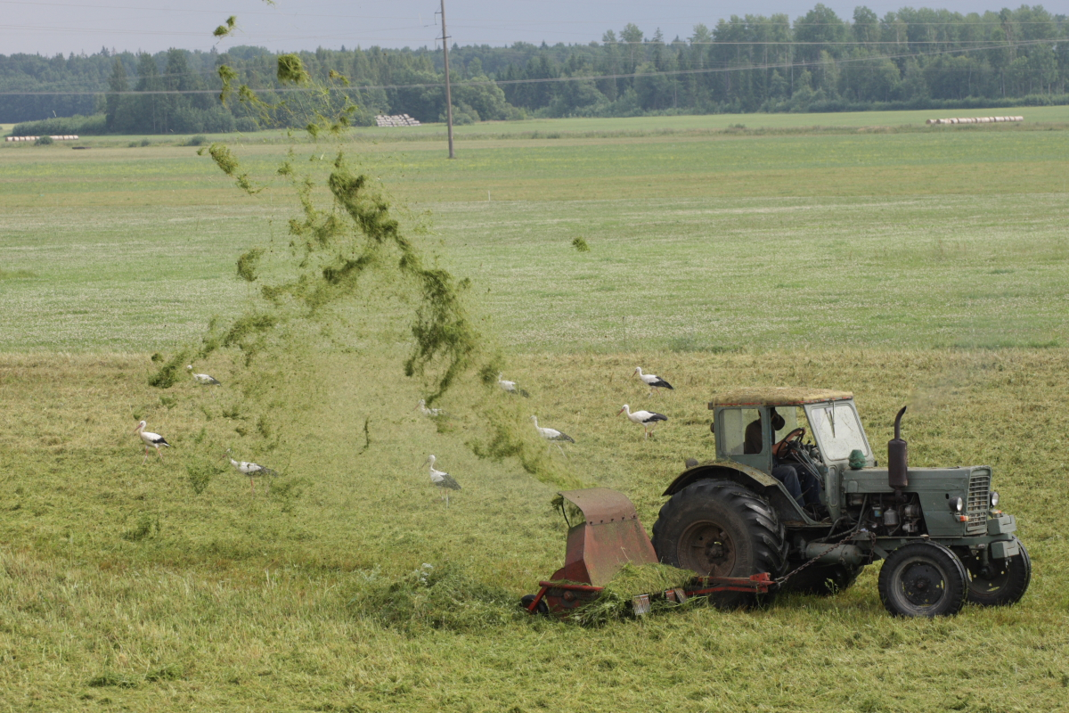 Valged Toonekured toitu otsimas